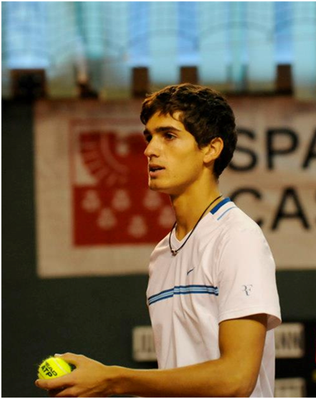 Pierre-Hugues Herbert au tournoi Challenger d'Ortisei (ITA) en novembre 2012